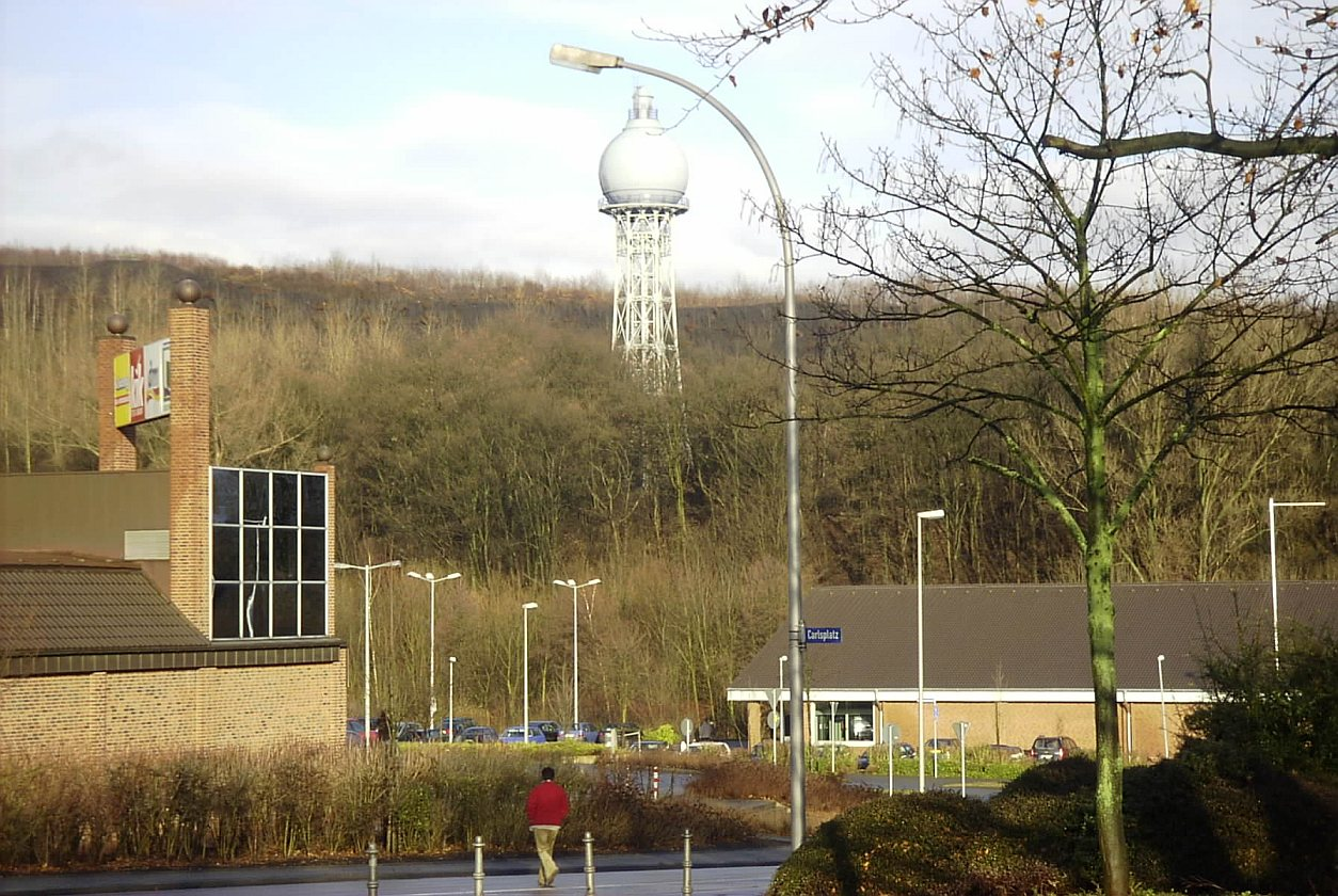 Wasserturm der stillgelegten Zeche Carolus Magnus in Übach-Palenberg.